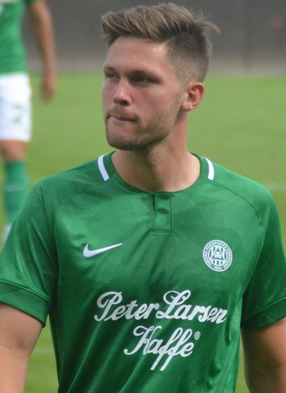 Andreas Albers i kamp for Viborg FF